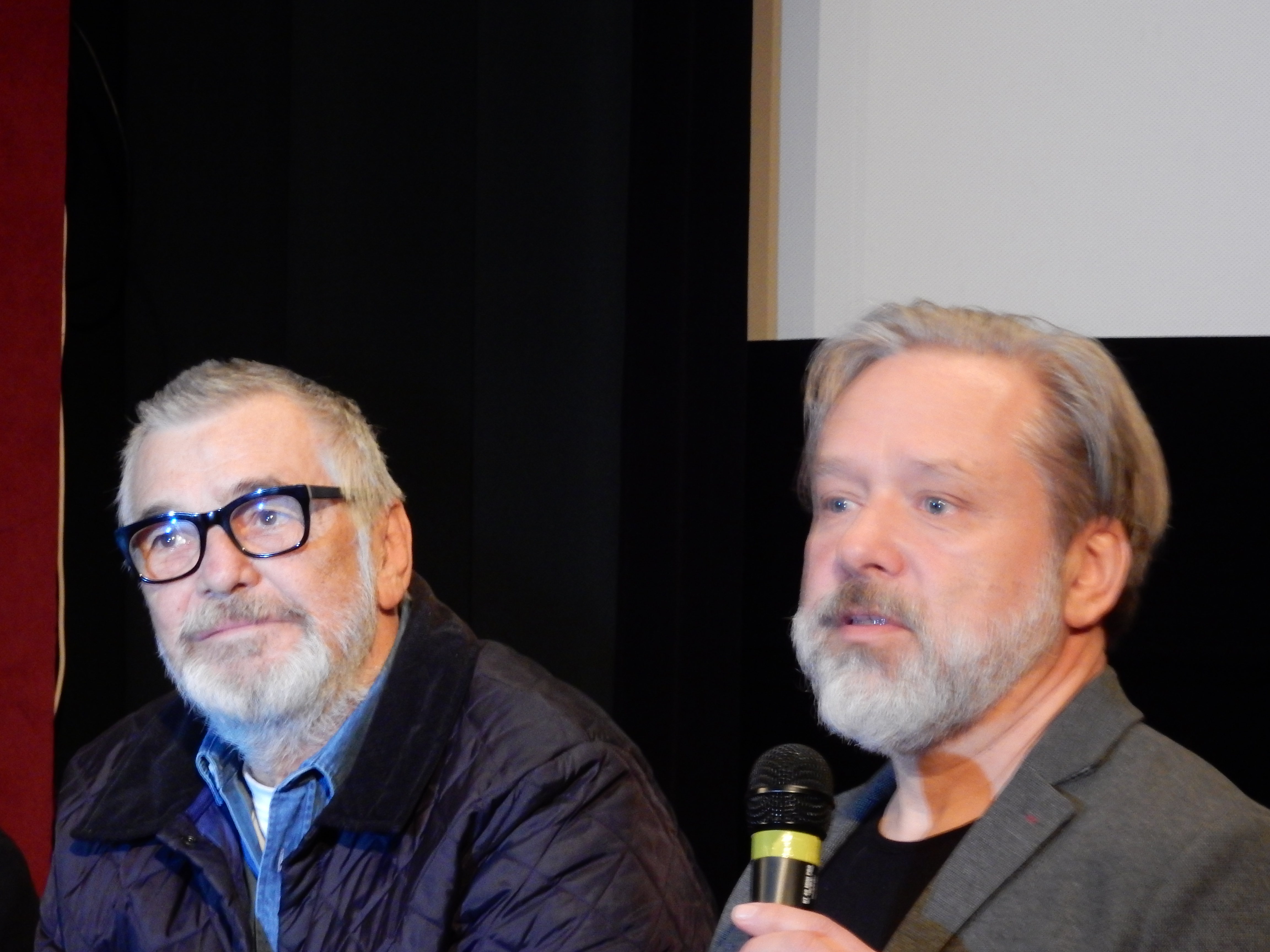 Fotky z novinářské konference 23.3.2016 Autor: (Blanka Borová (Karolína Černá) pro Kritiky.cz & 10Mpix.cz